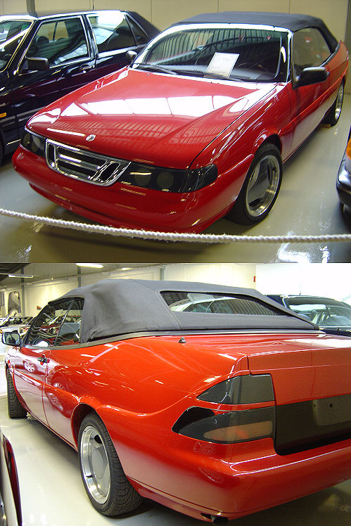 Saab 9000 avokonseptiauto Uudenkaupungin Automuseossa 2004.